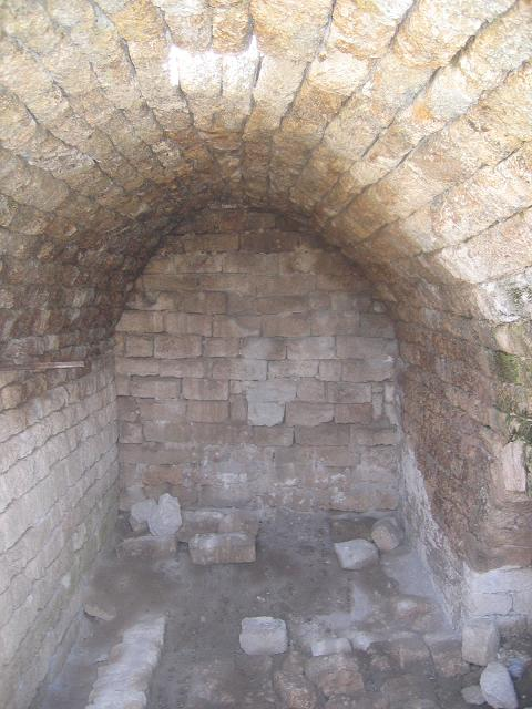 קמרון במבצר הצלבני כפרלט.תמונה שצילמתי והעלתי במרץ 2006.אסף.צ 13:10, 3 מרץ 2006 (UTC)